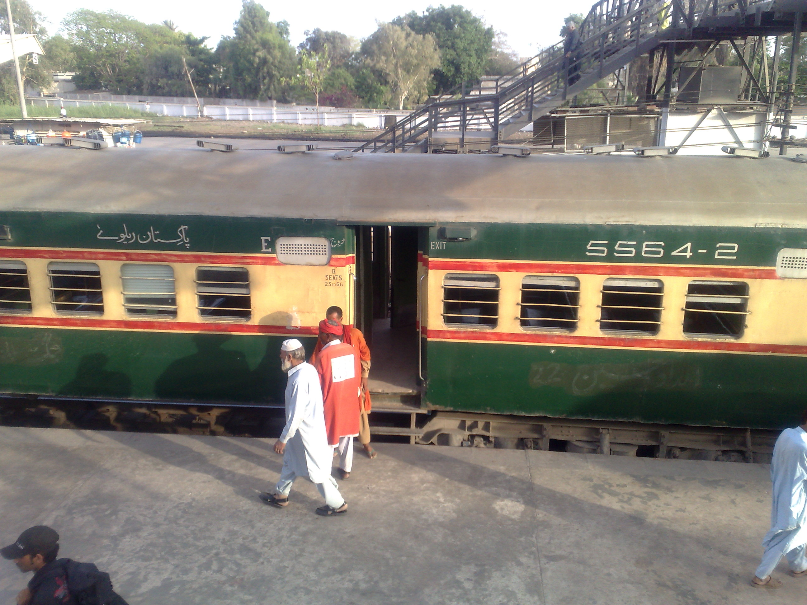 Pakistan Railways